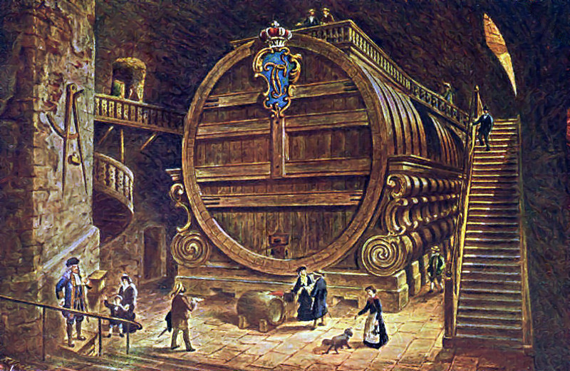 Tonneau géant de Heidelberg